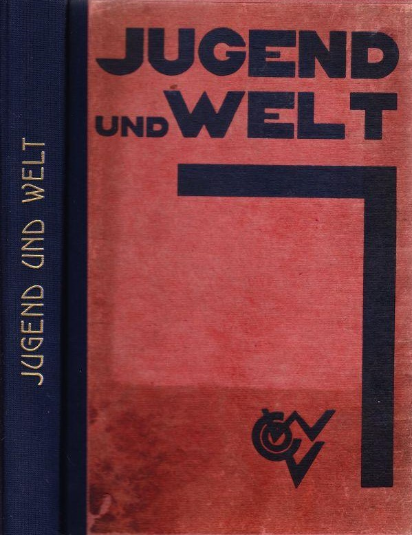 Jugend und Welt. Jahrbuch 1928. Herausgegeben von Rudolf Arnheim, Cl. With und E. L. Schiffer (das ist Edith Jacobsohn). Williams & Co. Verlag; Berlin-Grunewald, 1928